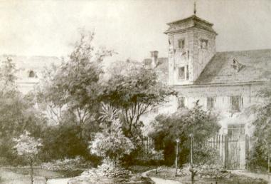 Gartenseite des ehem. Mesmer-Hauses in Wien